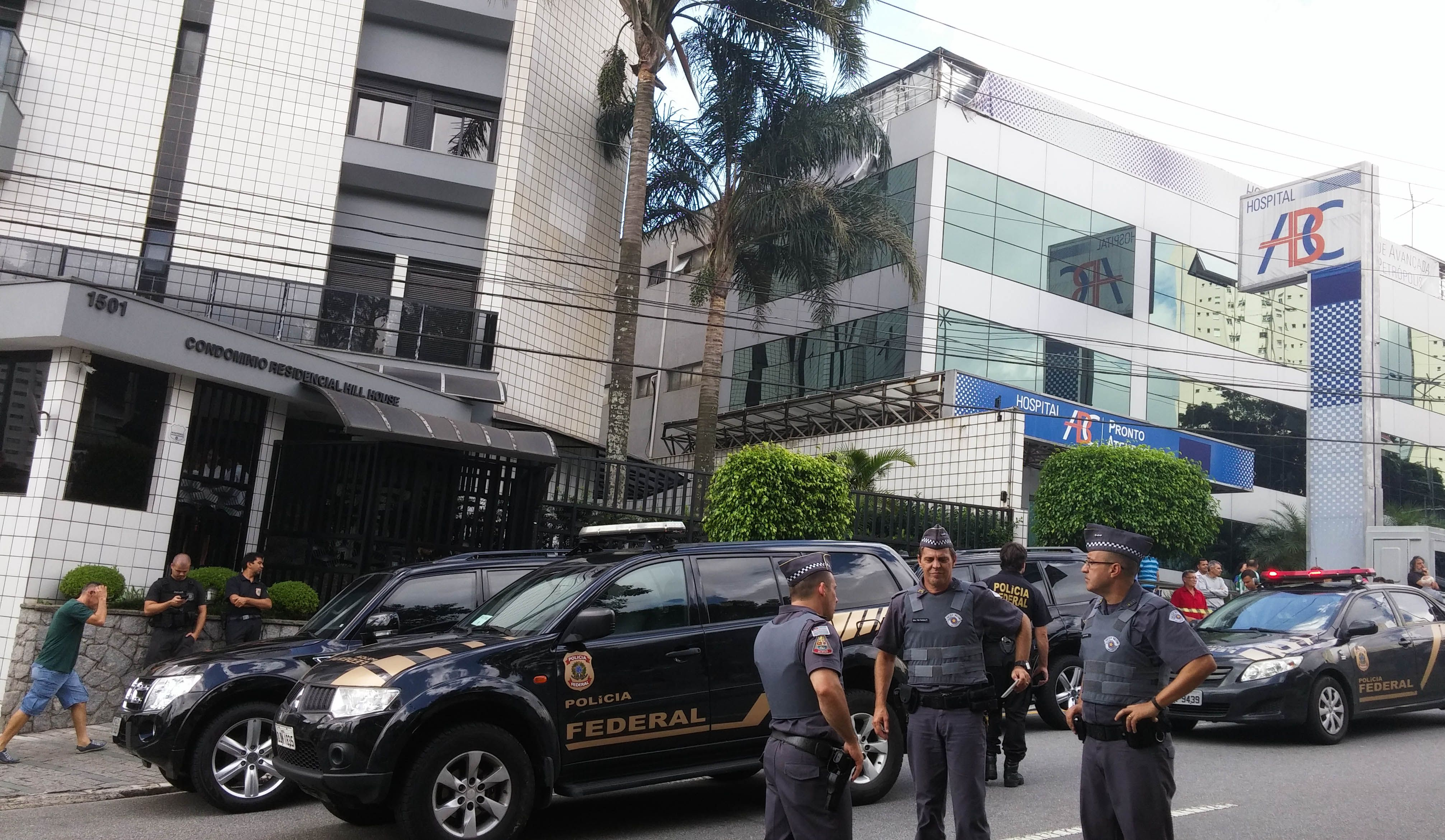 Manifestantes contrários e favoráveis a Lula se concentram em frente ao prédio o ex-presidente Lula depois de sua condução à Polícia Federal para depoimento.